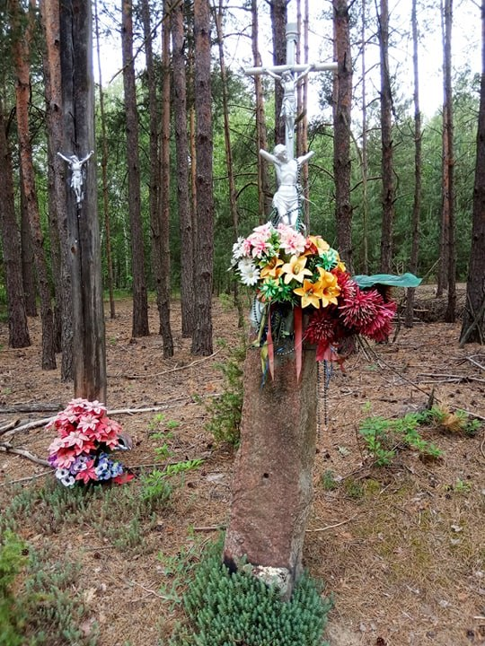 Leszczyny, krzyż z początku XX w.